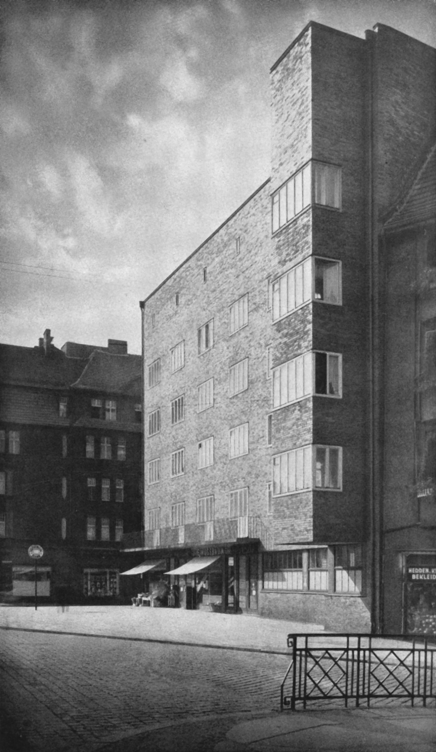 Sparkasse Hindenburg (Zabrze). Architekt: Dominikus Böhm